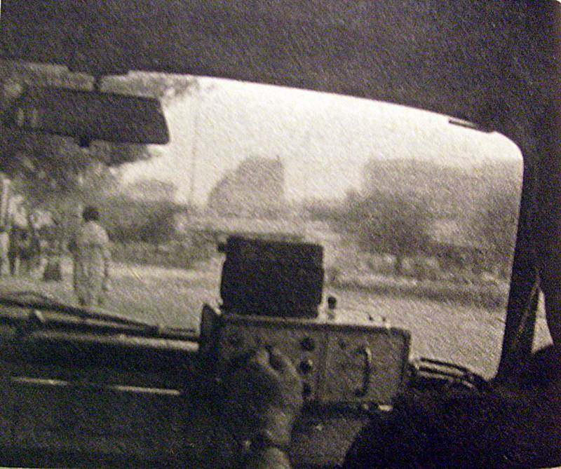 traffipax za szybą samochodu